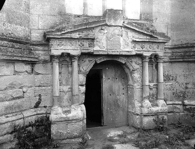 Portail.